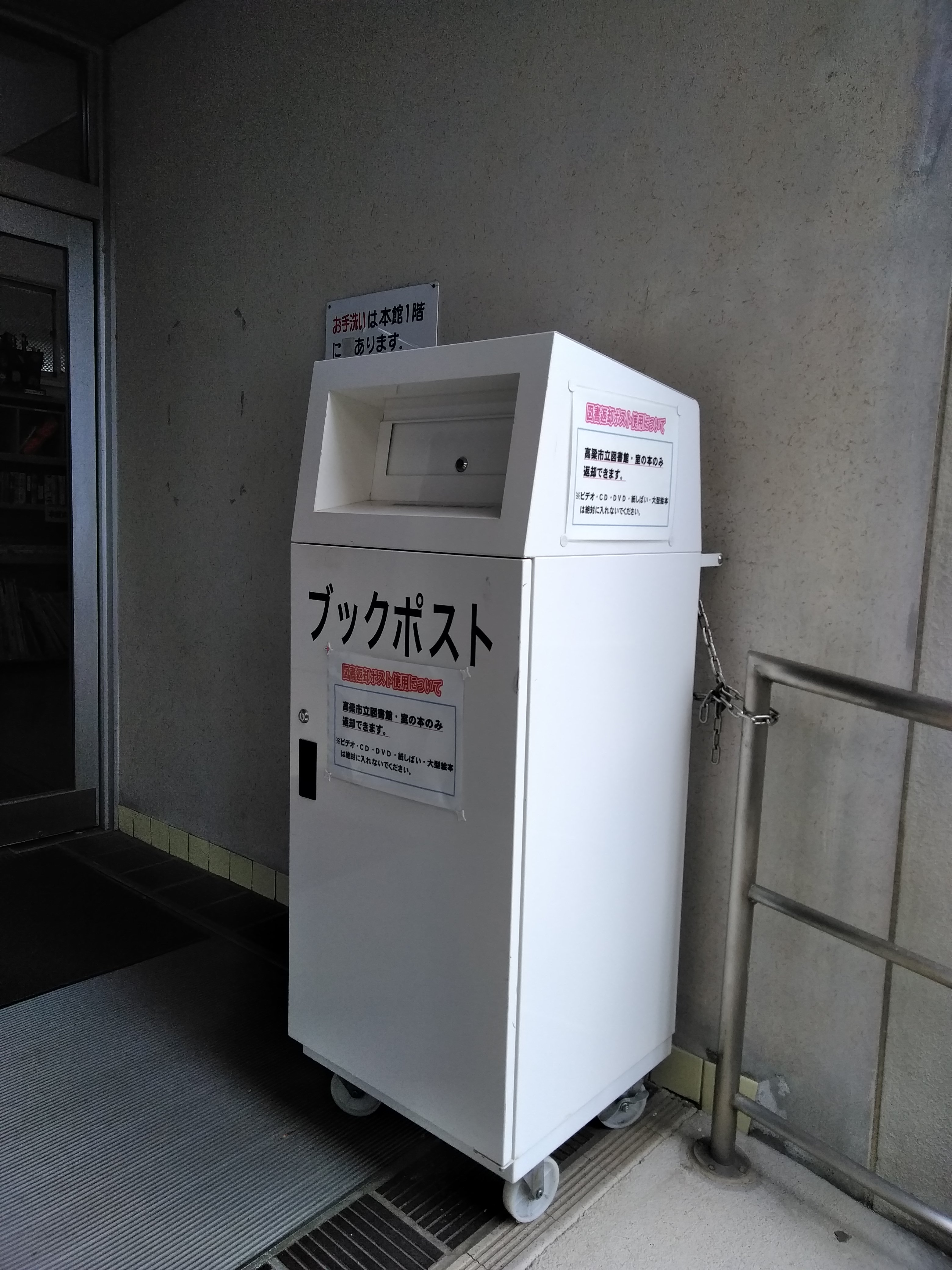 高梁市立成羽図書館のブックポスト